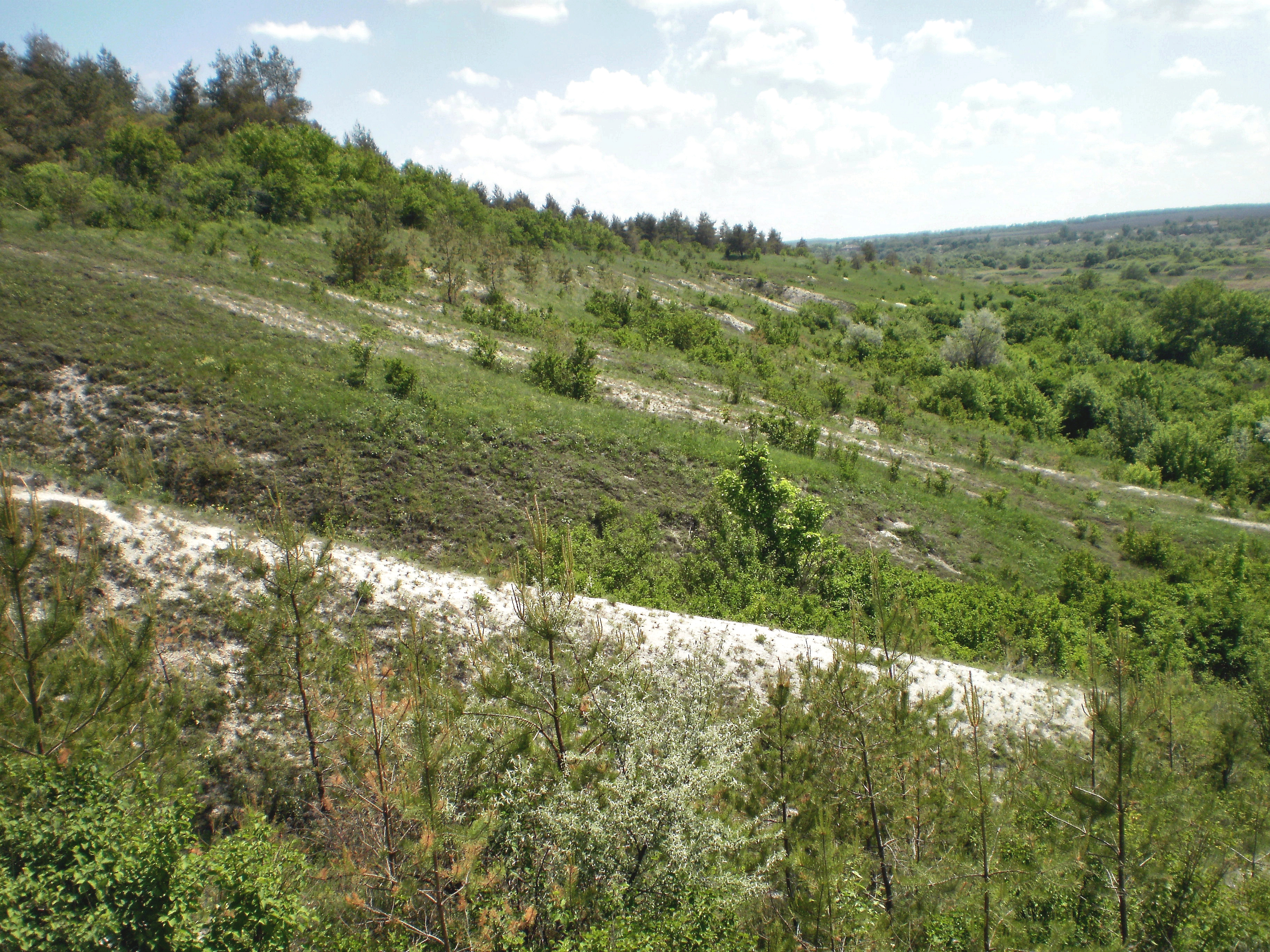 Правый берег реки Плотва высокий и крутой. На поверхность выходят многометровые слои мела. «Меловые горы» на берегу Плотвы — визитная карточка Захаровки. Дождевые воды проточили в этих пластах гигантские овраги перпендикулярно течению реки